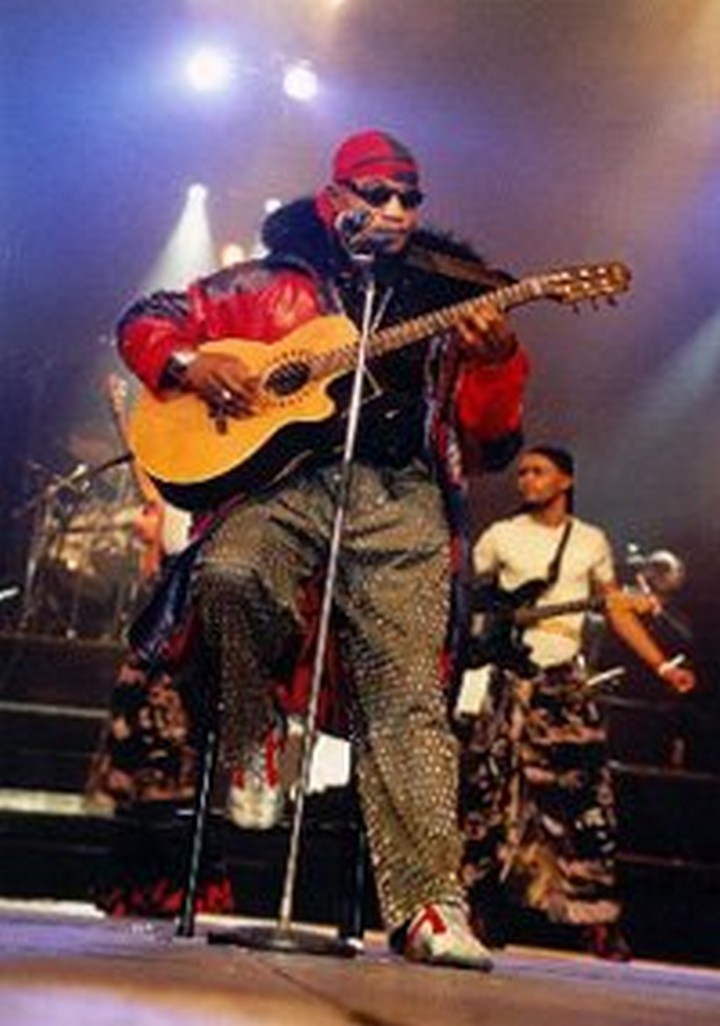 Koffi Olomidé "Le Grand Mopao" lors de son concert à Bercy en février 2000.